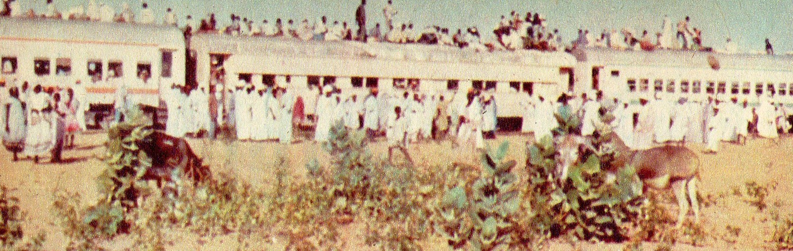 Linia kolejowa Charum - Nyala (1985r.).